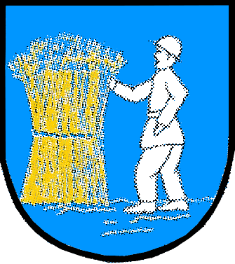 Herb Kostkowic